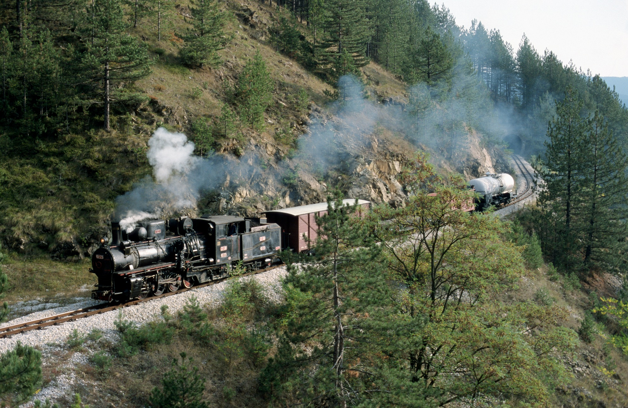 en: Special goods train for a group of Austrian railway enthusiasts on the Šarganska osmica heritage railway in Serbia. de: Fotogüterzug für eine Gruppe österreichischer Eisenbahnfreunde auf der Museumsbahn Šarganska osmica in Serbien.